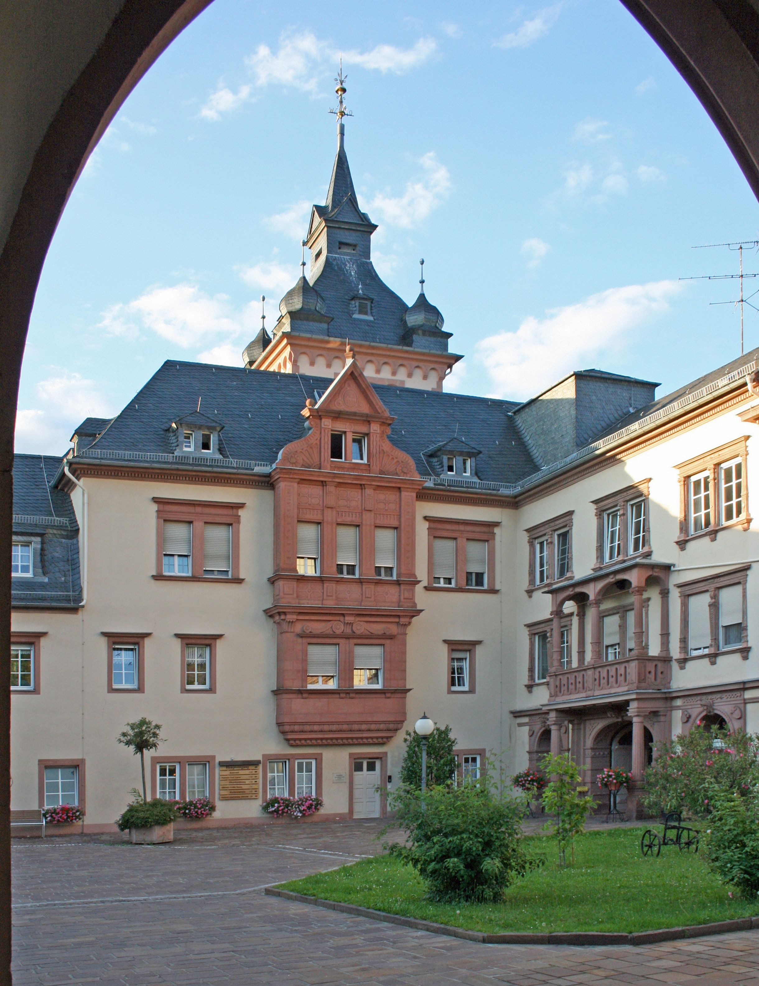 Schloss Meerholz bei Gelnhausen, Blick in den Hof.